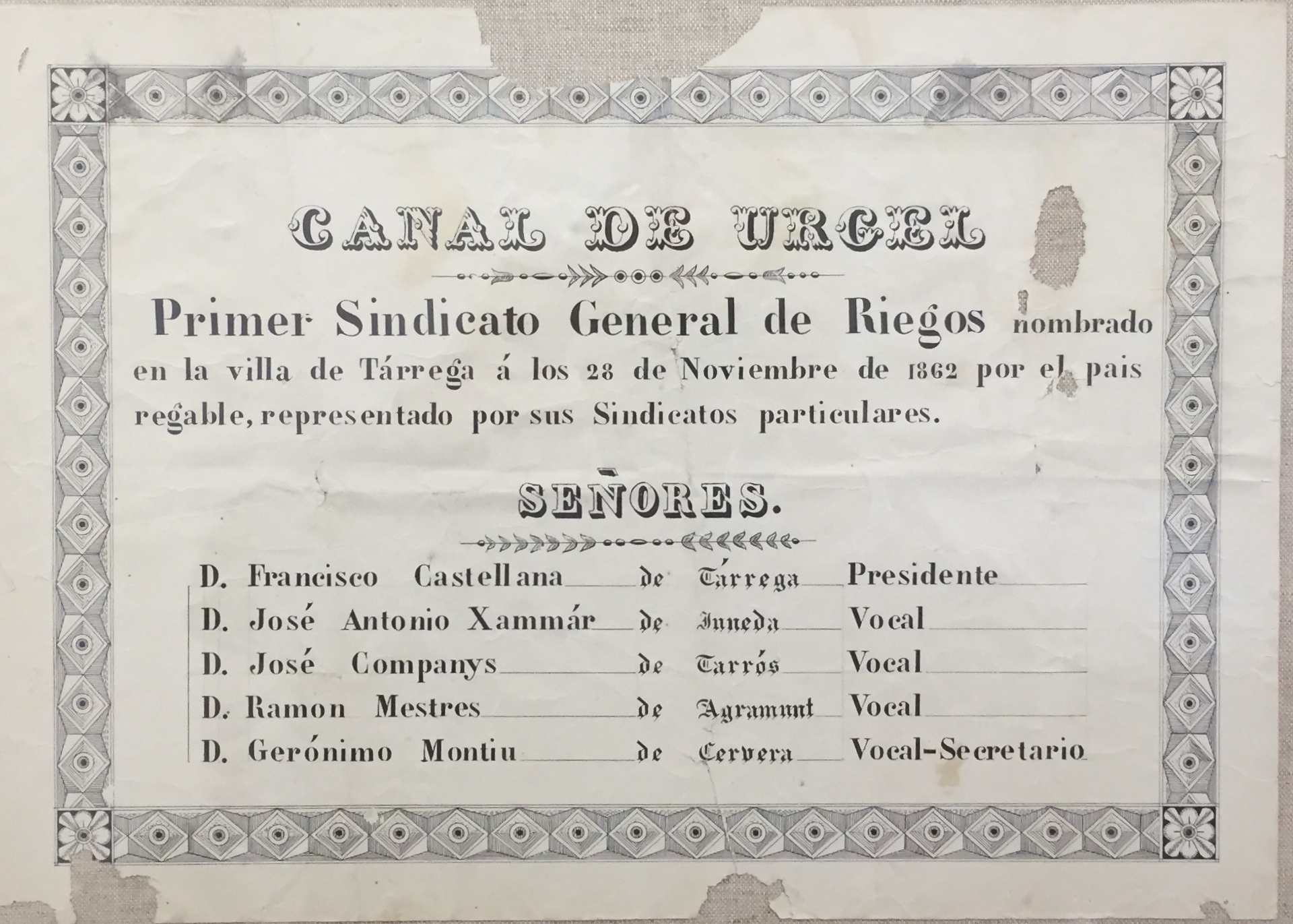 Fotografia de l'orla commemorativa del Primer Sindicat General de Regants dels Canals d'Urgell al 1862, pejada a les dependencies de la seu de la Comunitat